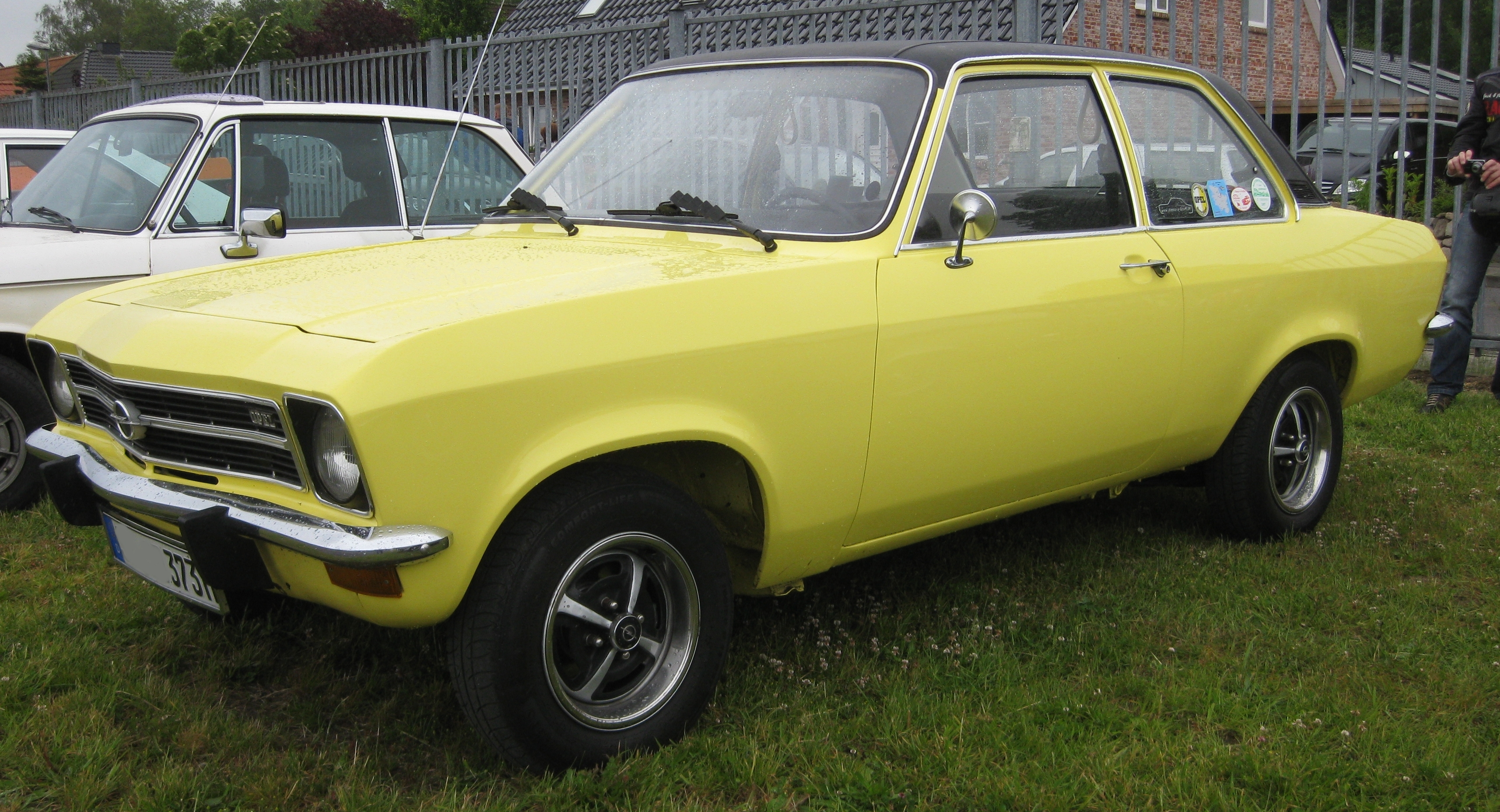 Opel Ascona A 16